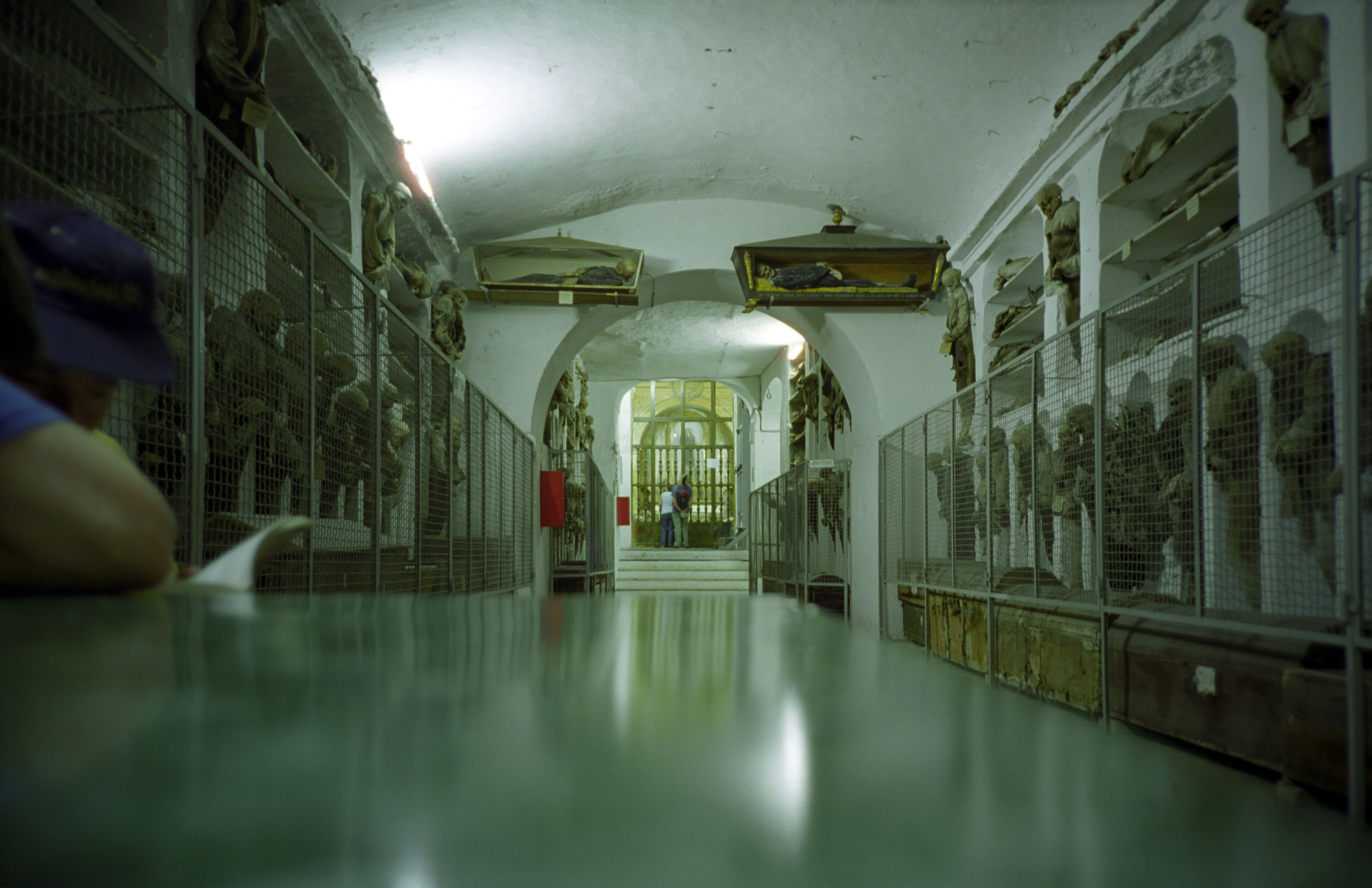 Kapuzinergruft in Palermo, Blick vom Eingangsbereich durch einen Teil des Mönchsganges zur Kapelle der Hl. Rosalia